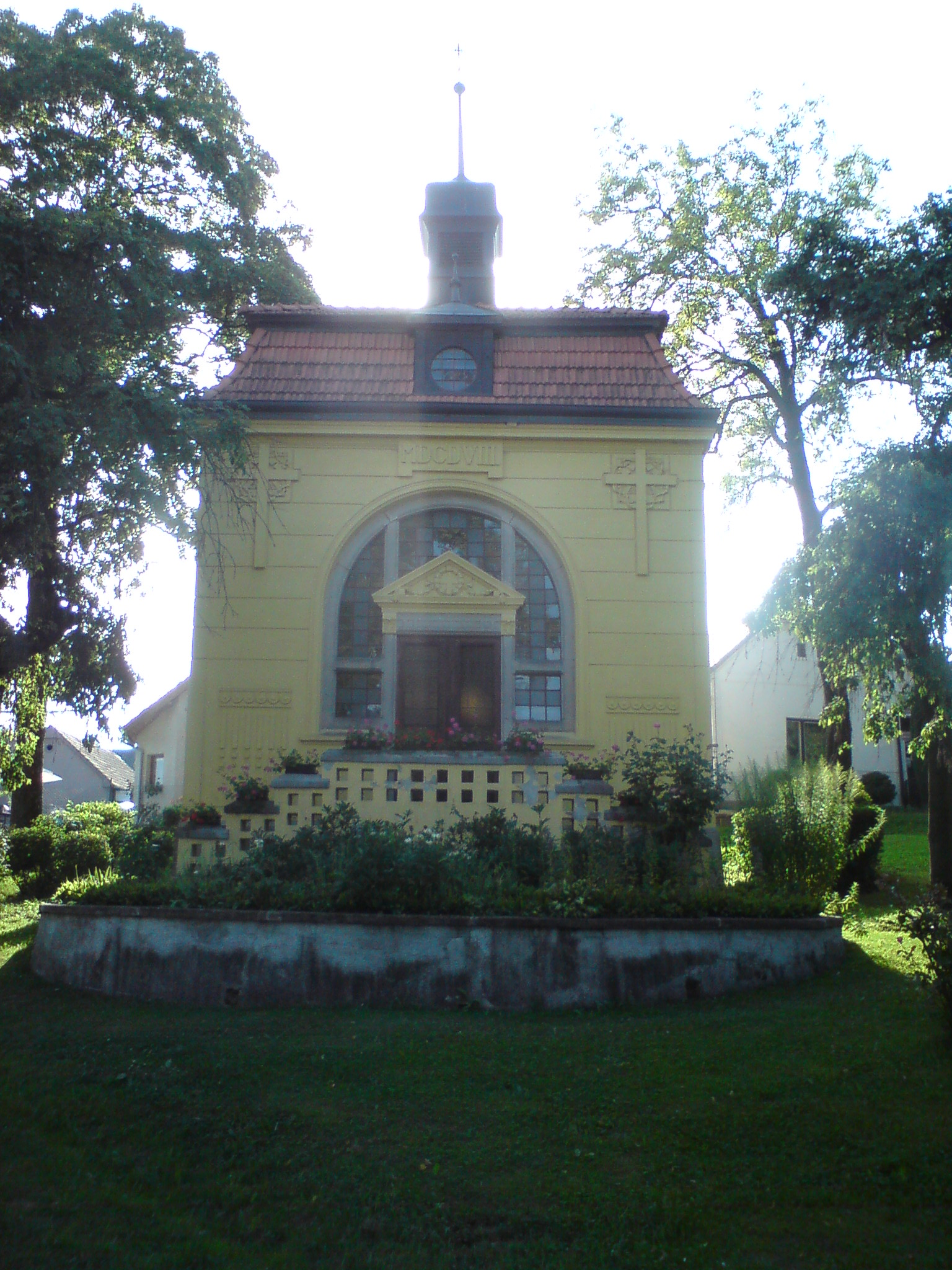 Kaple ve Zborově u Ledenic